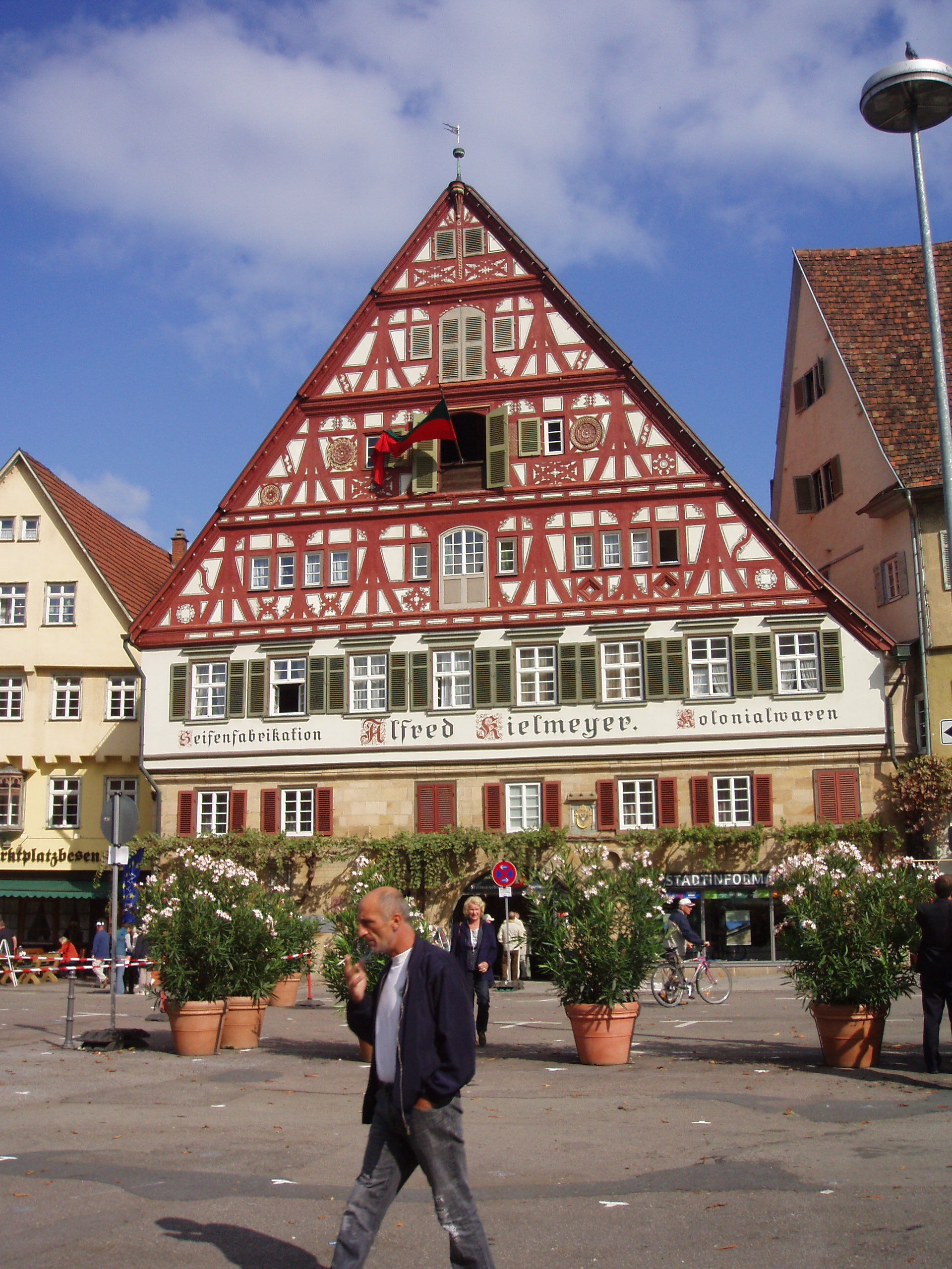 das Kielmeyerhaus in Esslingen